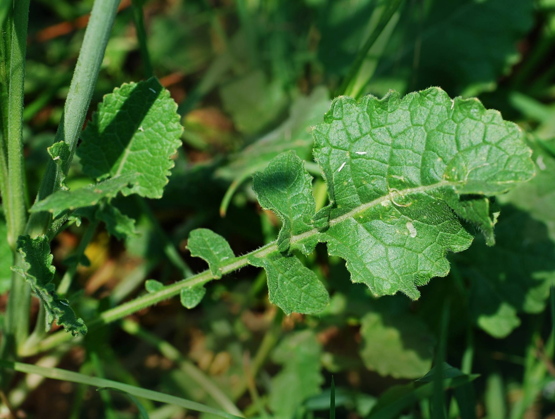 Sinapis arvensis, moutarde des champs, feuille